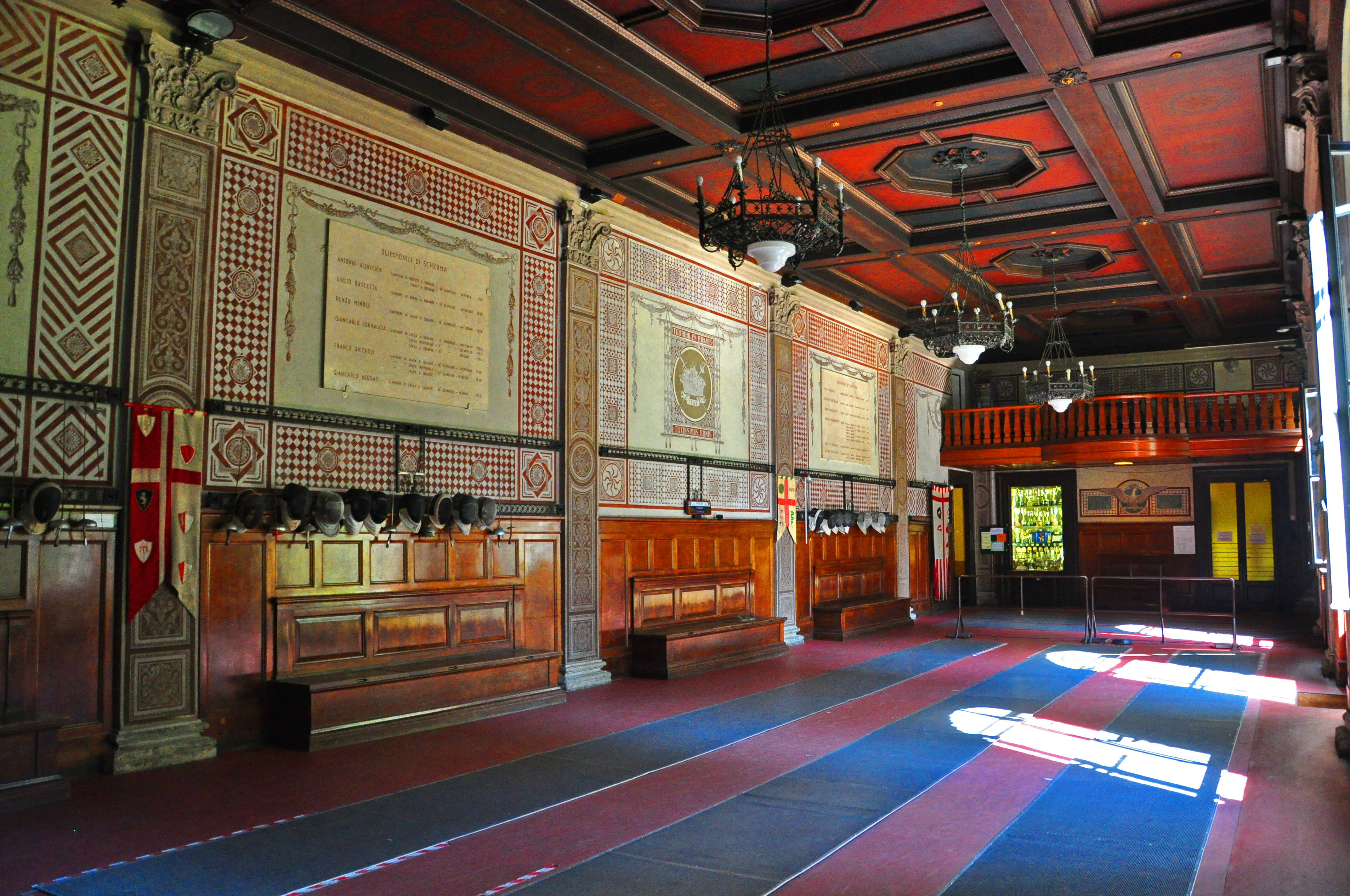 Sala d'armi del Palazzo Spinola a Milano, la famosa sala da scherma della Società del Giardino